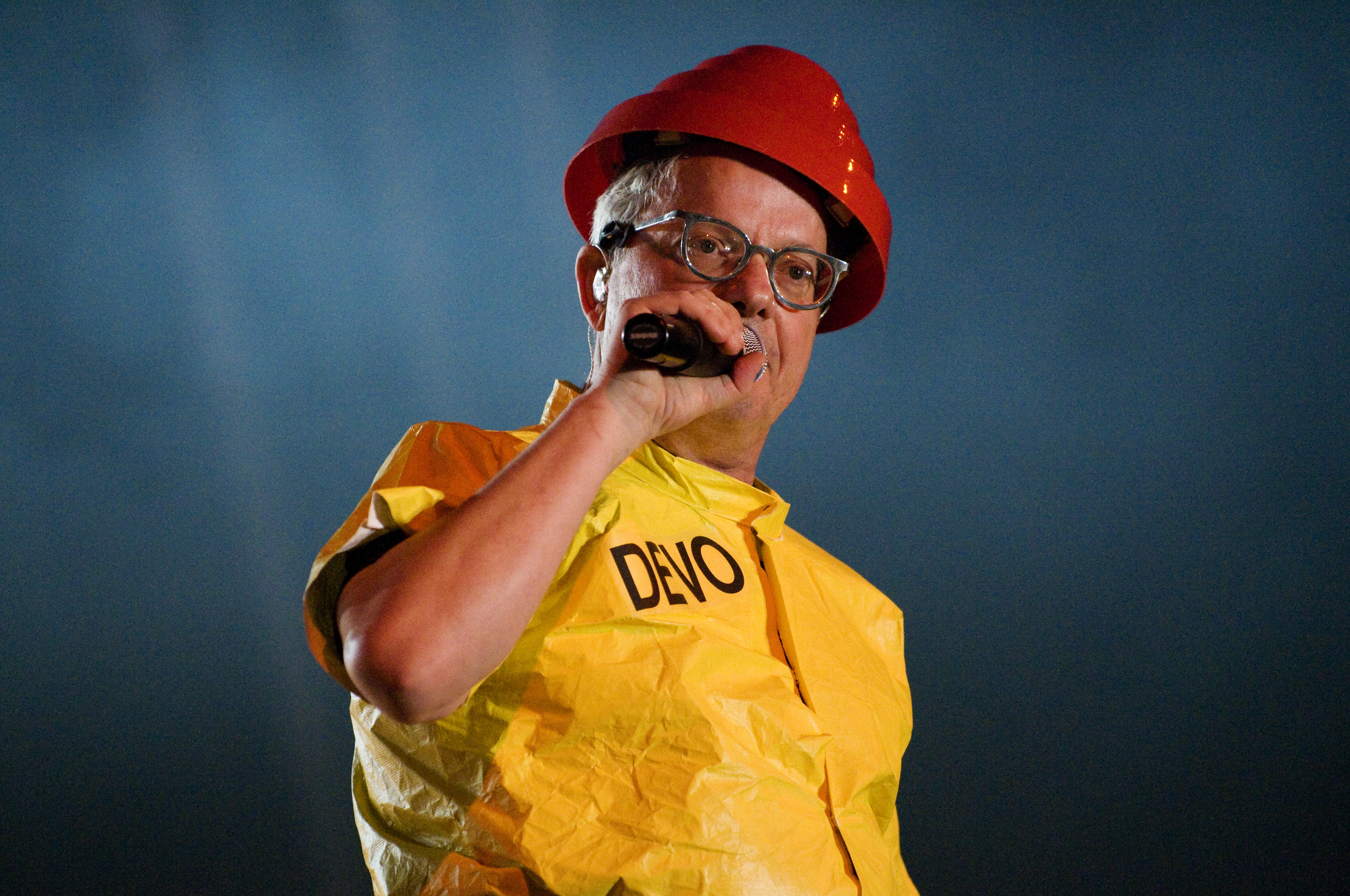 Devo - American New Wave band